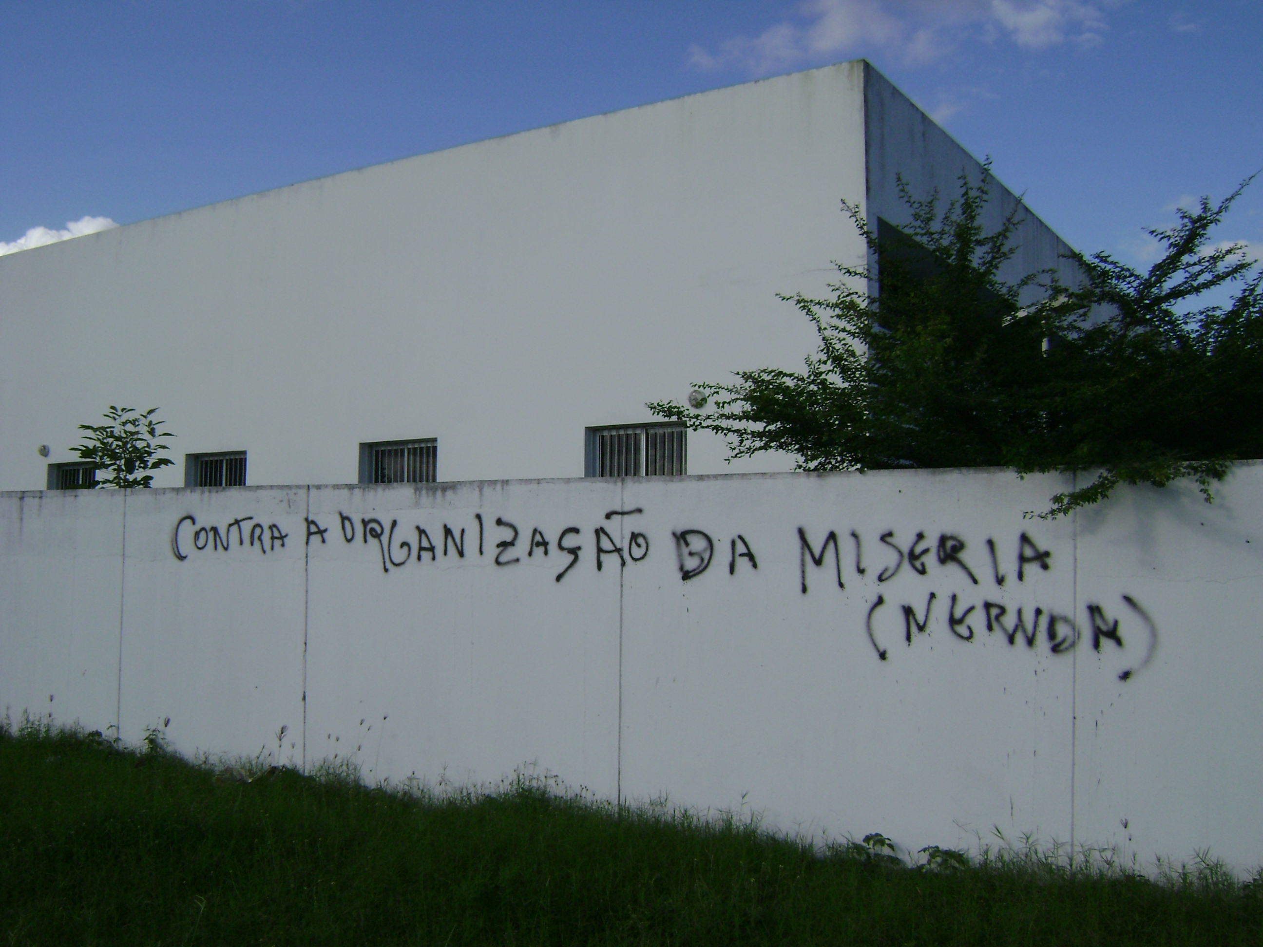 Frase Contra a organização da miséria em referência a Pablo Neruda, pichada em um muro de Feira de Santana, Bahia, Brasil.